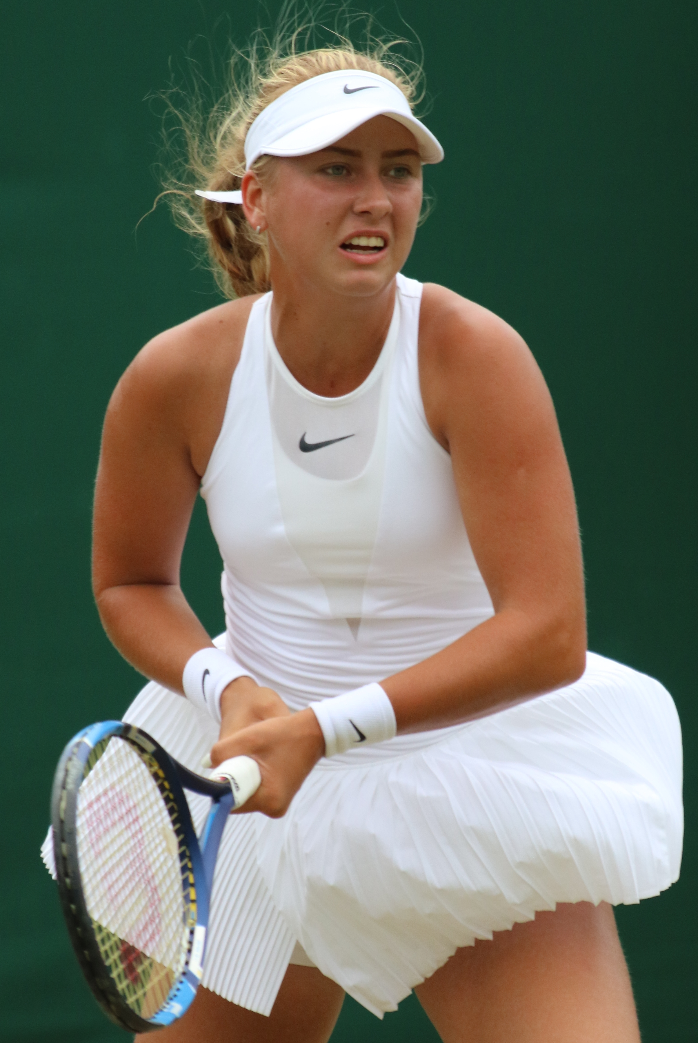 Potapova WM17 (5)